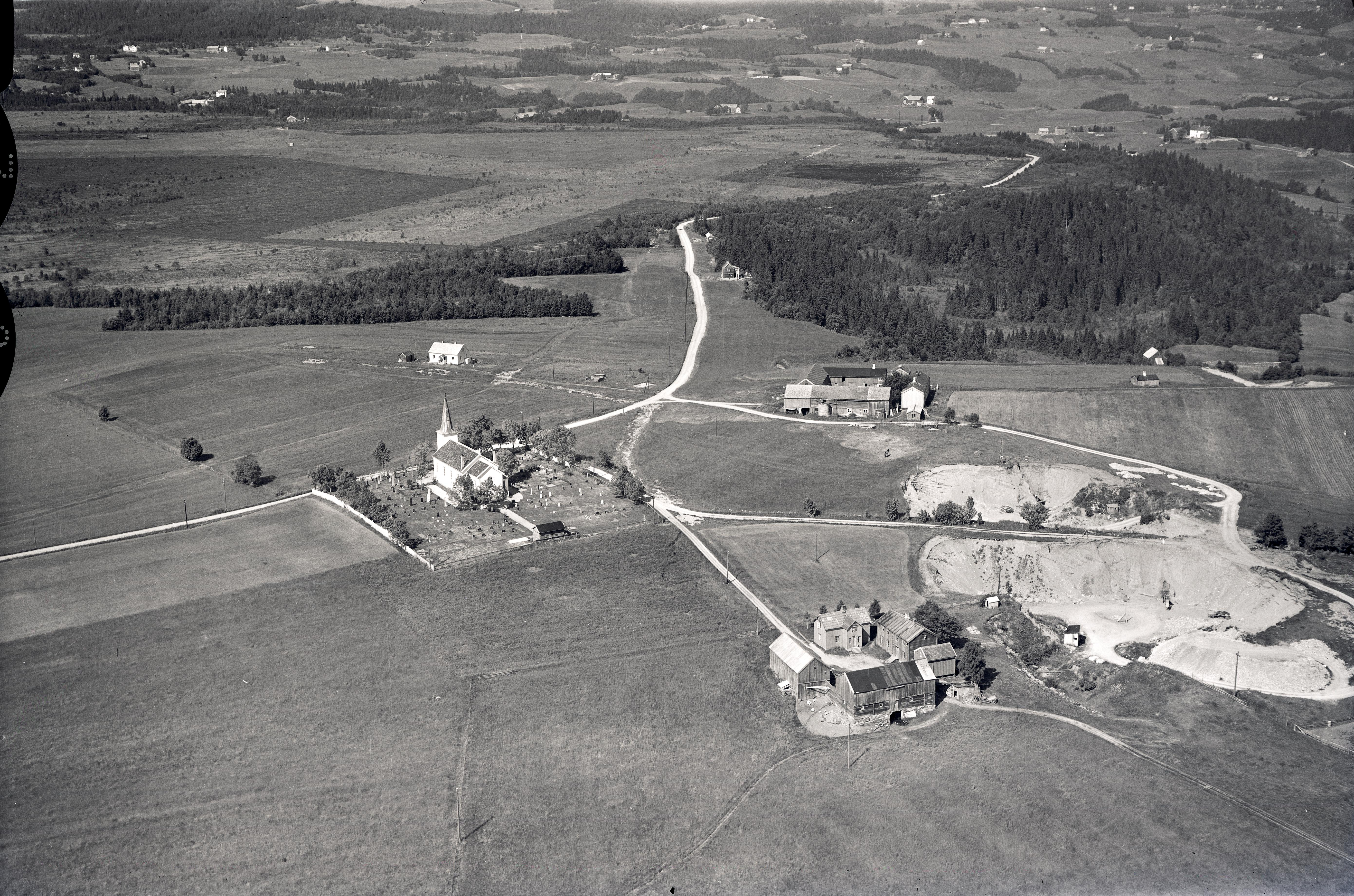 versiktsbilde over Tiller: Tiller kirke og kirkegård, Sjetnan (Skjetnan) øvre, Sjetnemyra (Skjetnemyra), Tonstad. Sandtak, veier, skog, jorder, gårdsbruk.